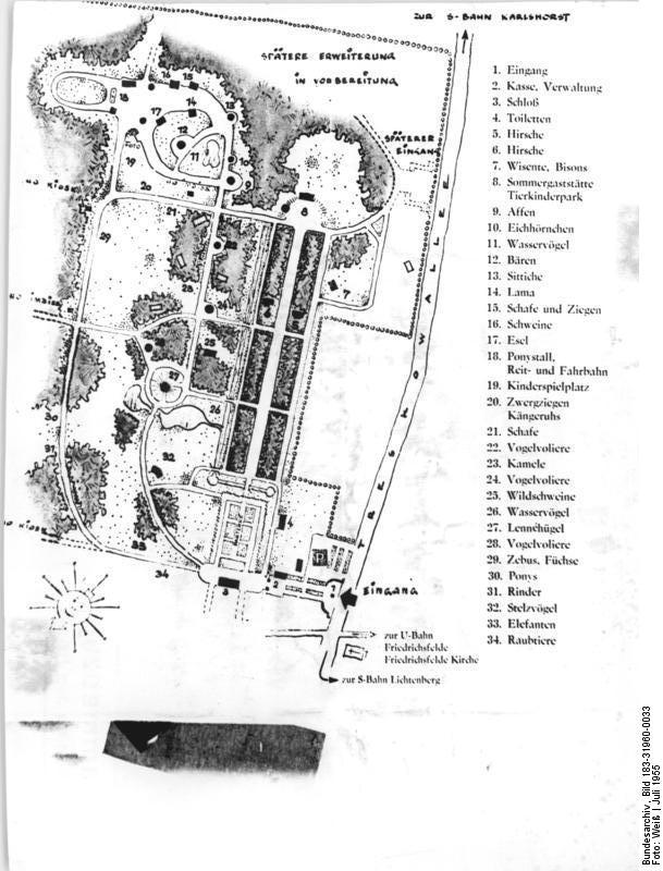 Berlin, Tierpark, Planskizze Zentralbild Repro 26.7.1955 Ein Tierpark für Berlin entstand. Am 2.7.1955 wurde im Schloßpark Friedrichsfelde der Berliner Tierpark durch den Oberbürgermeister Friedrich Ebert eröffnet. Der Tierpark entstand durch eifrige freiwillige Aufbauarbeit der Berliner Bevölkerung und wurde durch Mittel der Bärenlotterie und aus einer Tierpark-Lotterie unterstützt. Berliner Betriebe, Schulen, Zeitungen und befreundete Tiergärten des In- und Auslandes schenkten dem Tierpark die besten Tiere. UBz: Planskizze des Tierparks